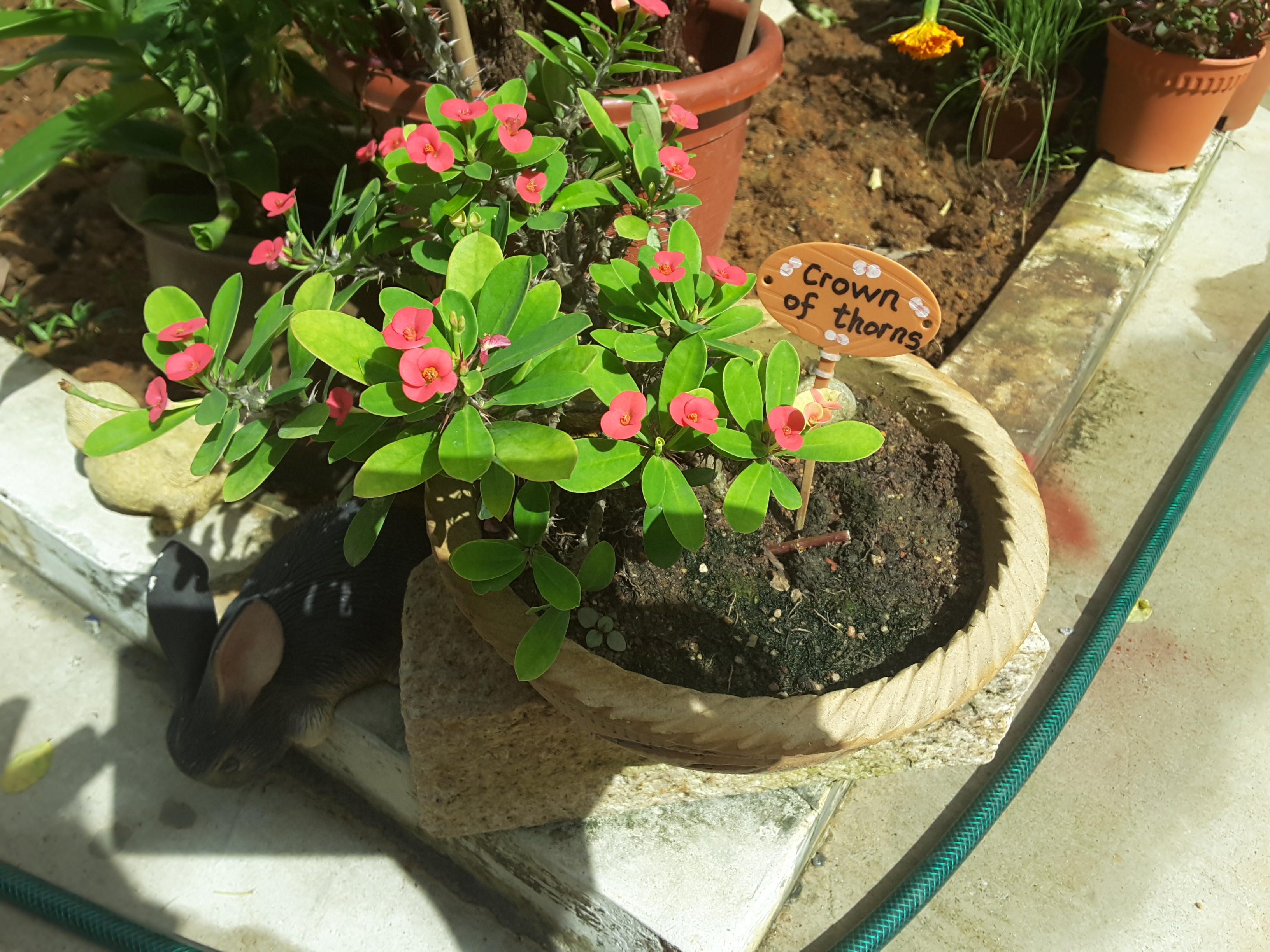 在新加坡種植虎刺梅